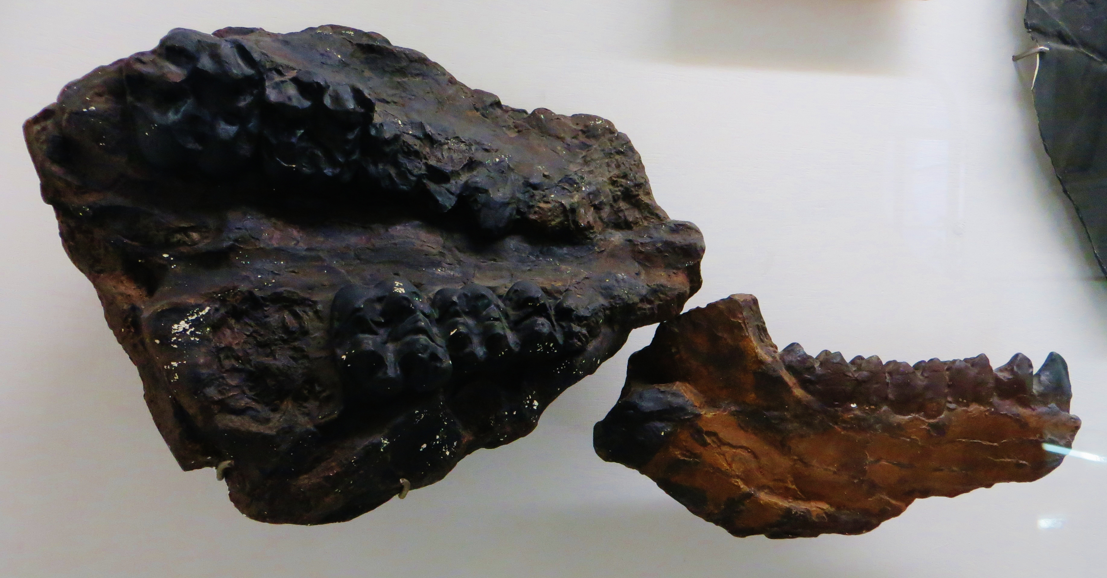 Fossil of Anthracotherium monsvialense, an extinct mammal- Took the photo at Museo di Storia Naturale di Verona